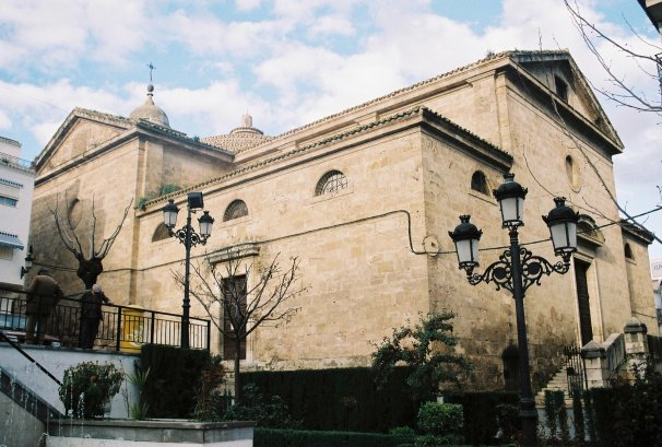 Iglesia de Santa María la Mayor, en la localidad de Algarinejo (provincia de Granada, España)